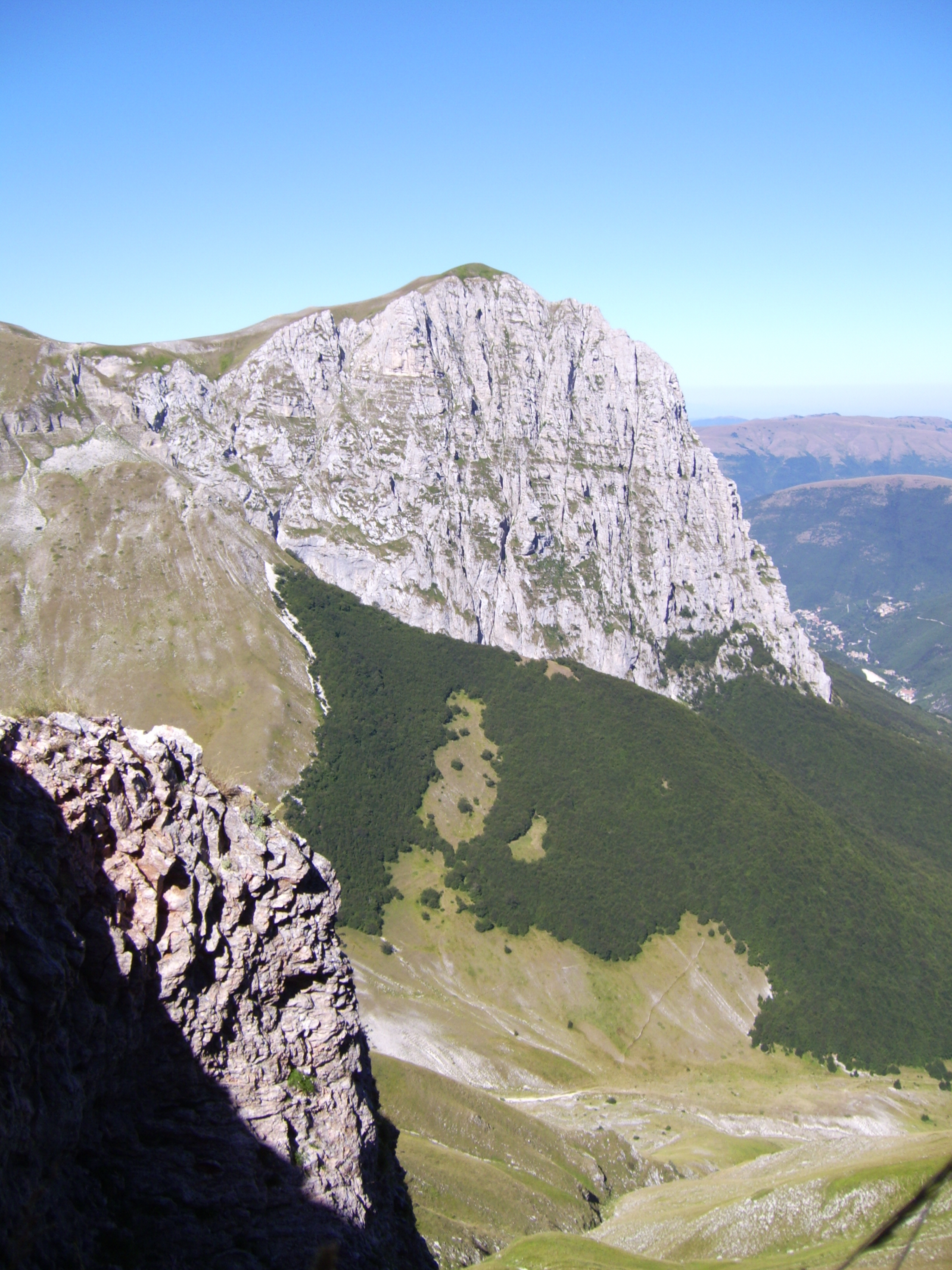 Monti Sibillini - Monte Bove Nord